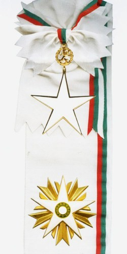 Орден "Стара планина" с лента